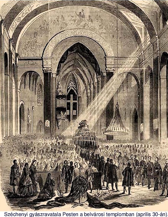 Széchenyi gyászravatala Pesten a belvárosi templomban 1860. április 30-án.